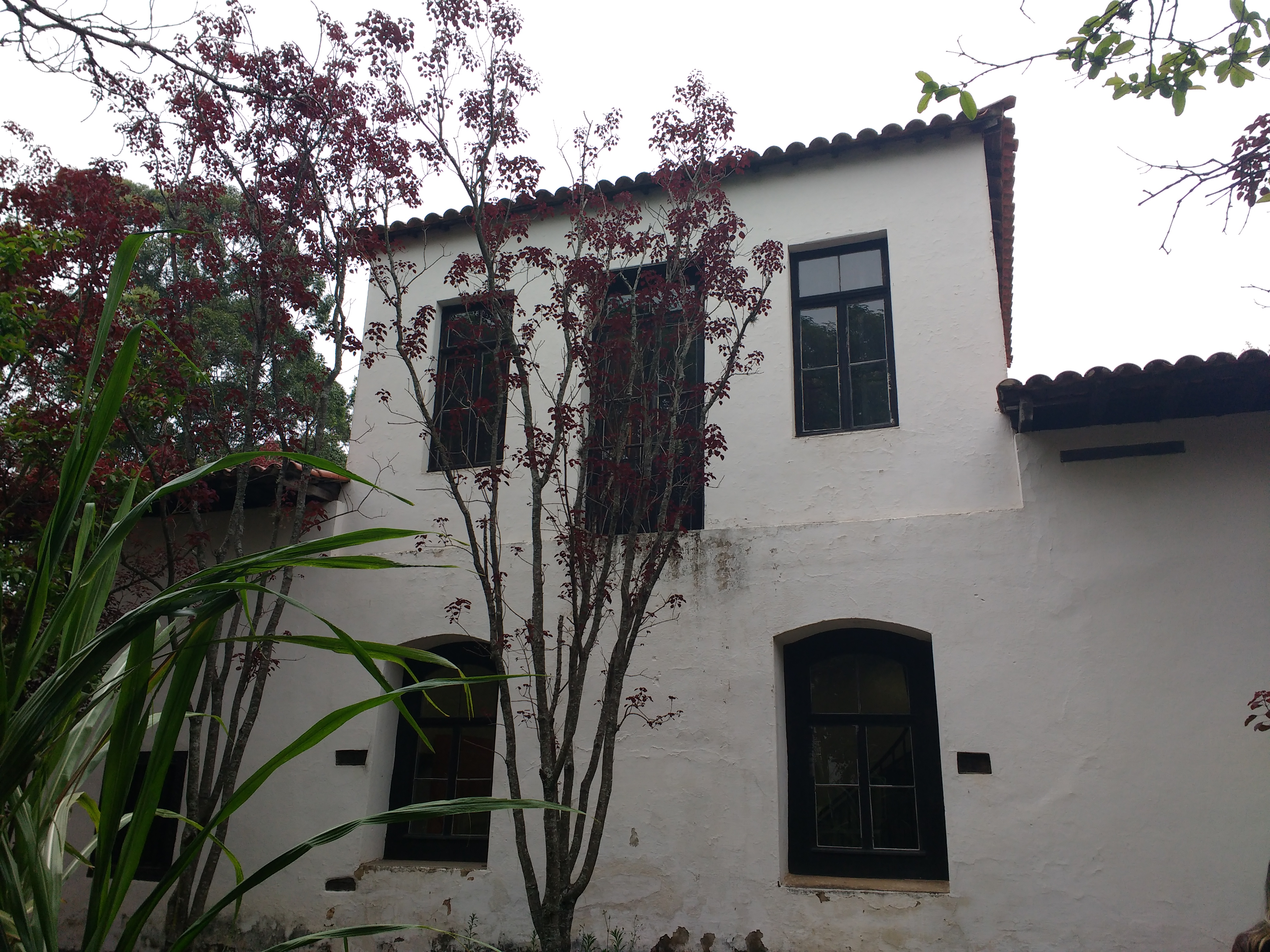 Visão do fundo do Sitio Morrinhos, com piso térreo e andar superior construído pelos beneditinos